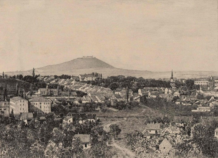 Pohled na Nový Jičín, v pozadí hrad Starý Jičín